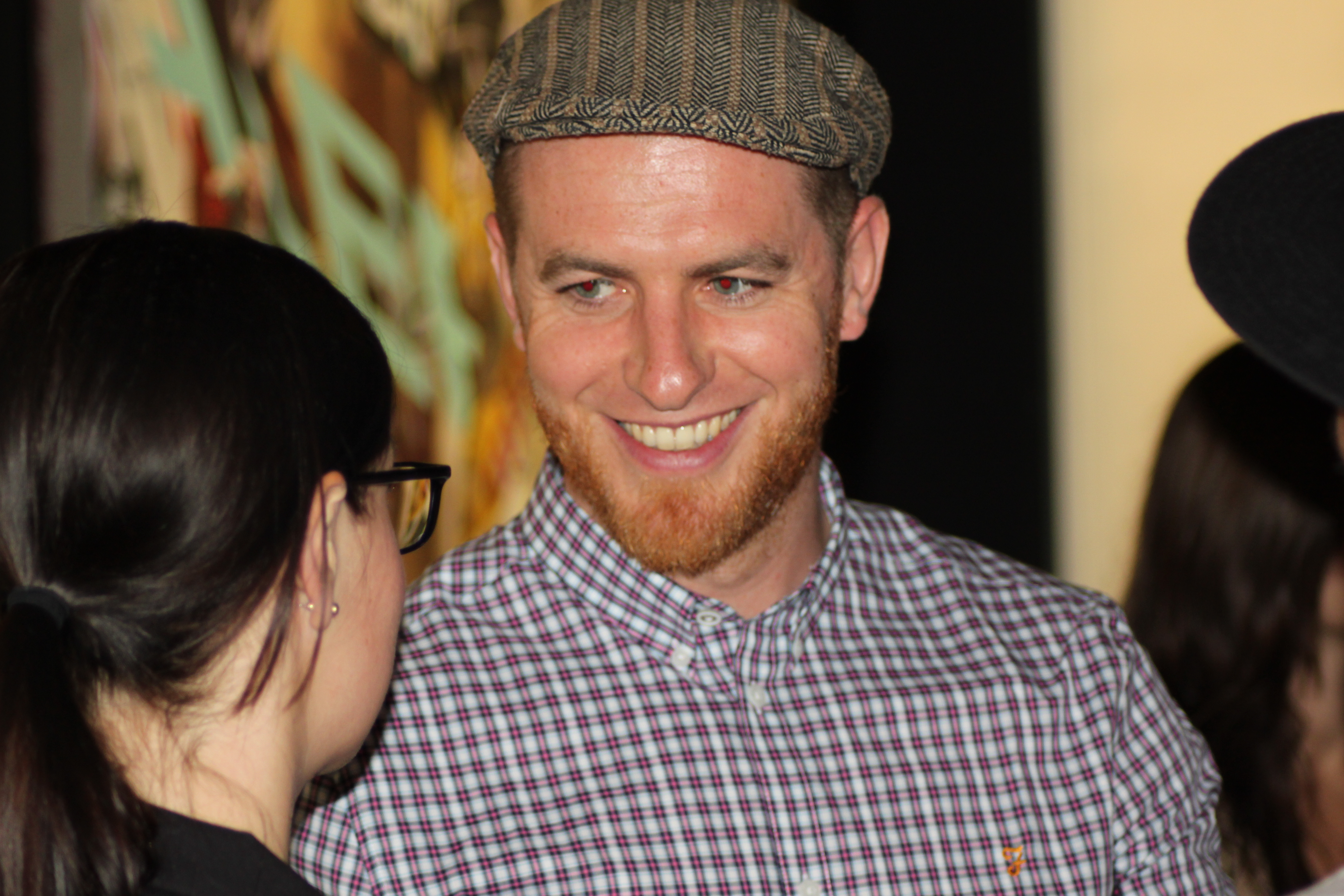 conor harrington juni 2010